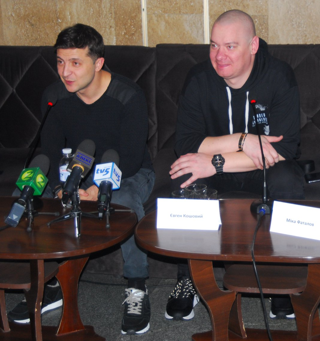 Кошевой, Фаталов и Зеленский